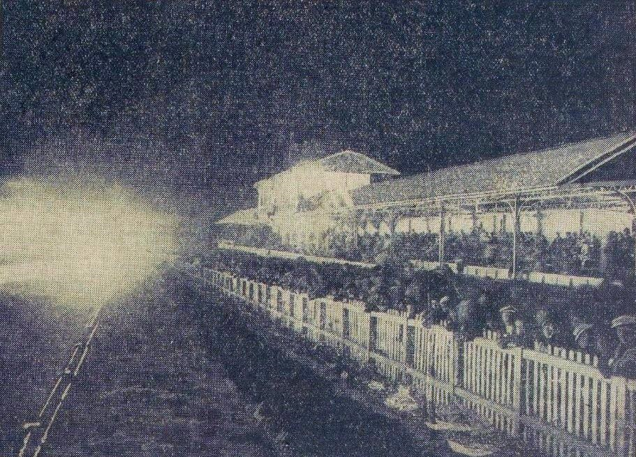 Les 24 Heures du Mans 1933 de nuit.